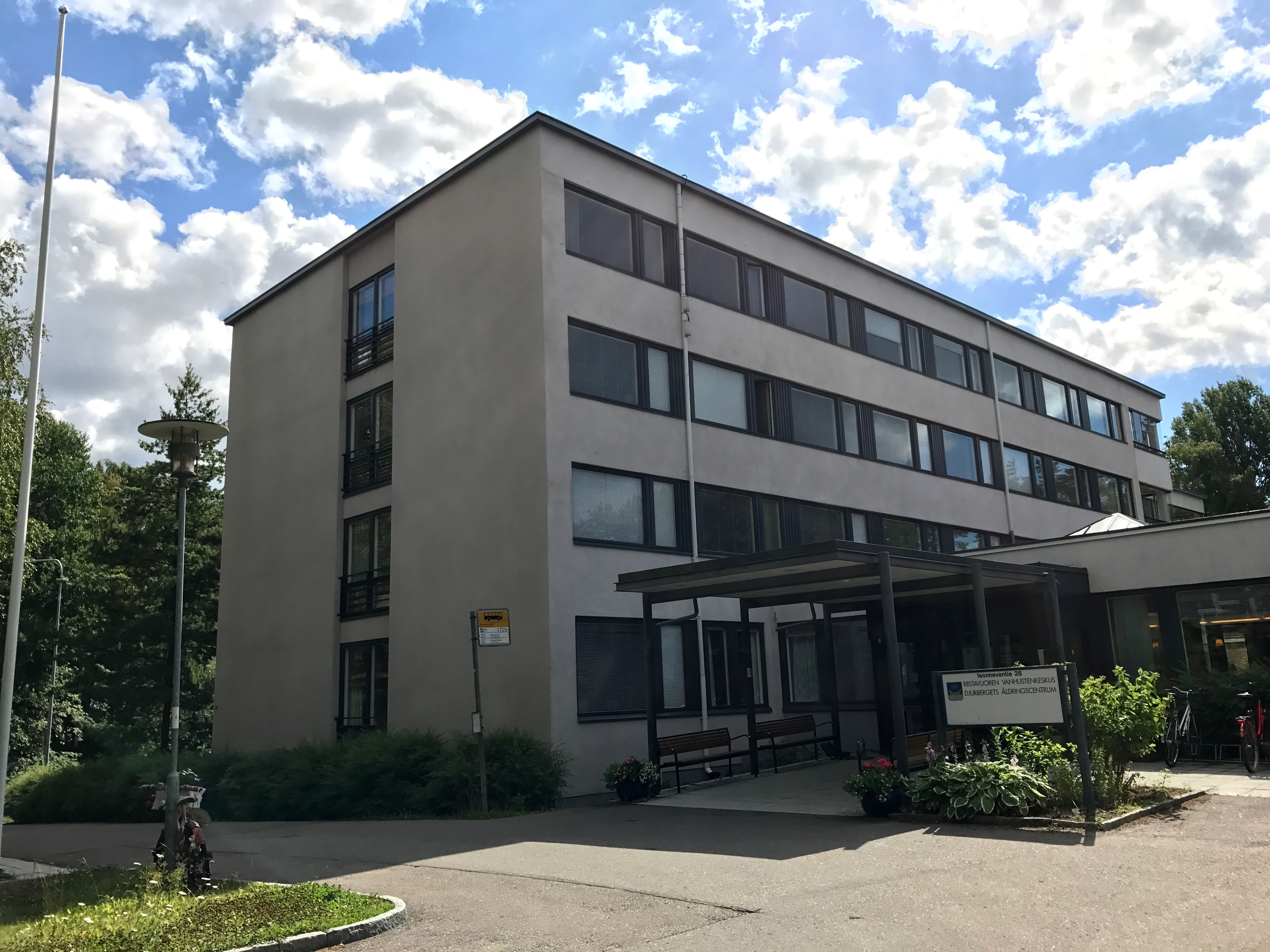 Riistavuoren vanhustenkeskus